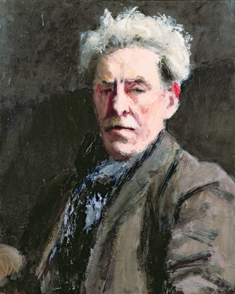 Self-portrait